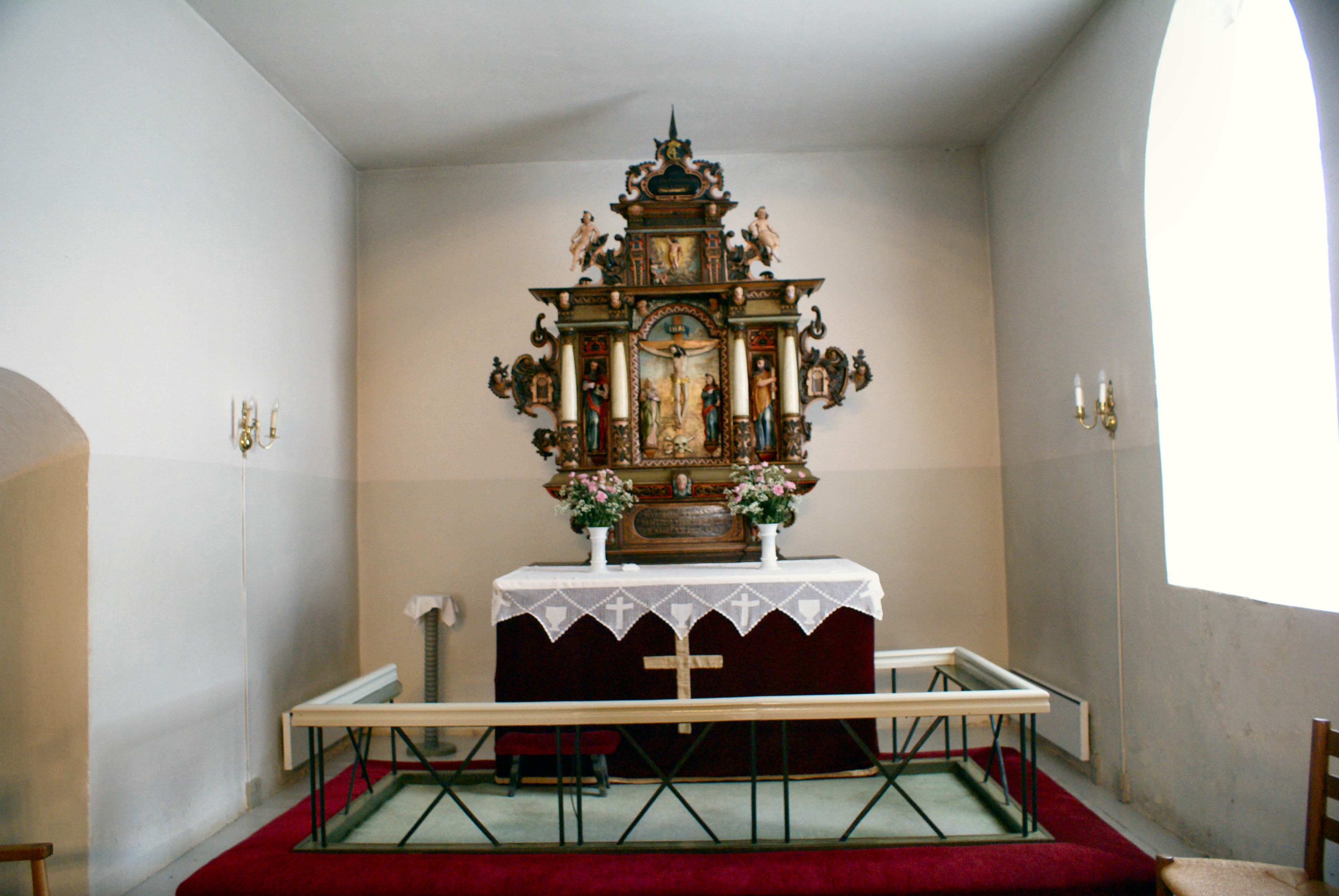 Odden Kirke, alter